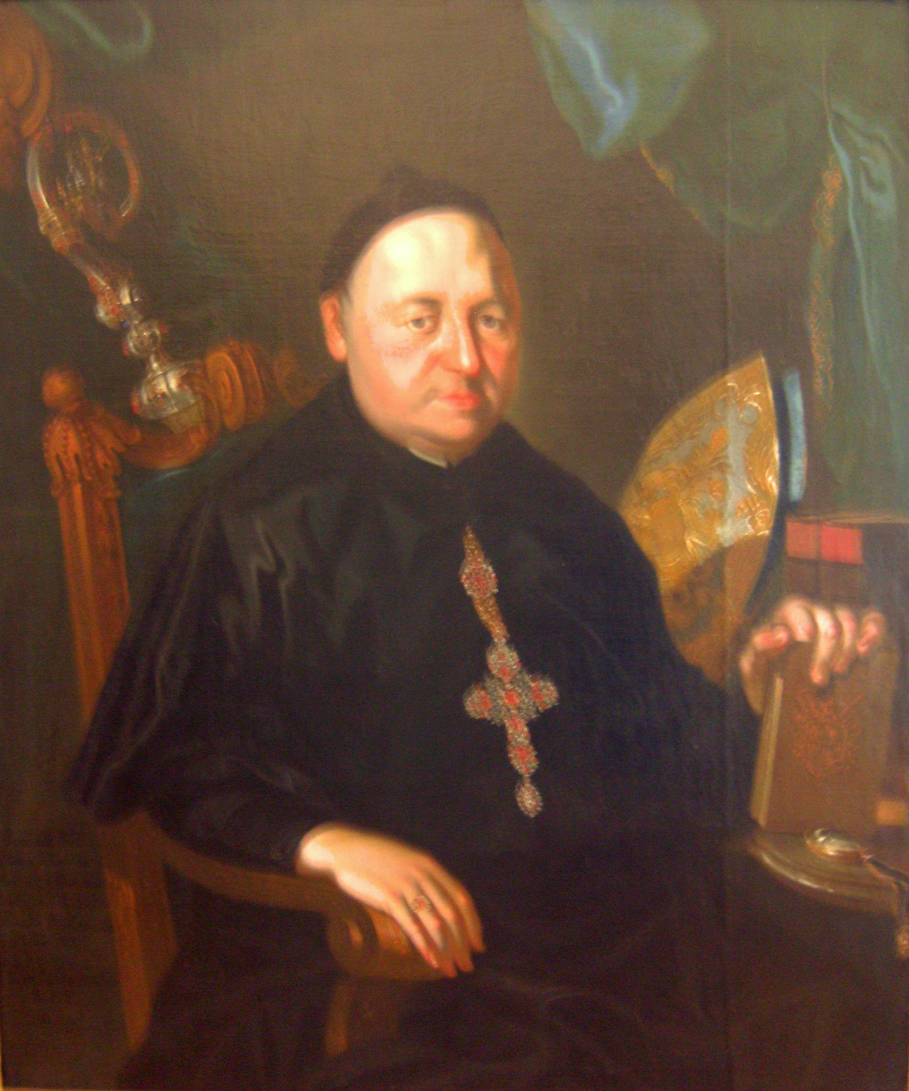 Romuald Weltin – 26. Reichsabt der Benediktinerreichsabtei Ochsenhausen